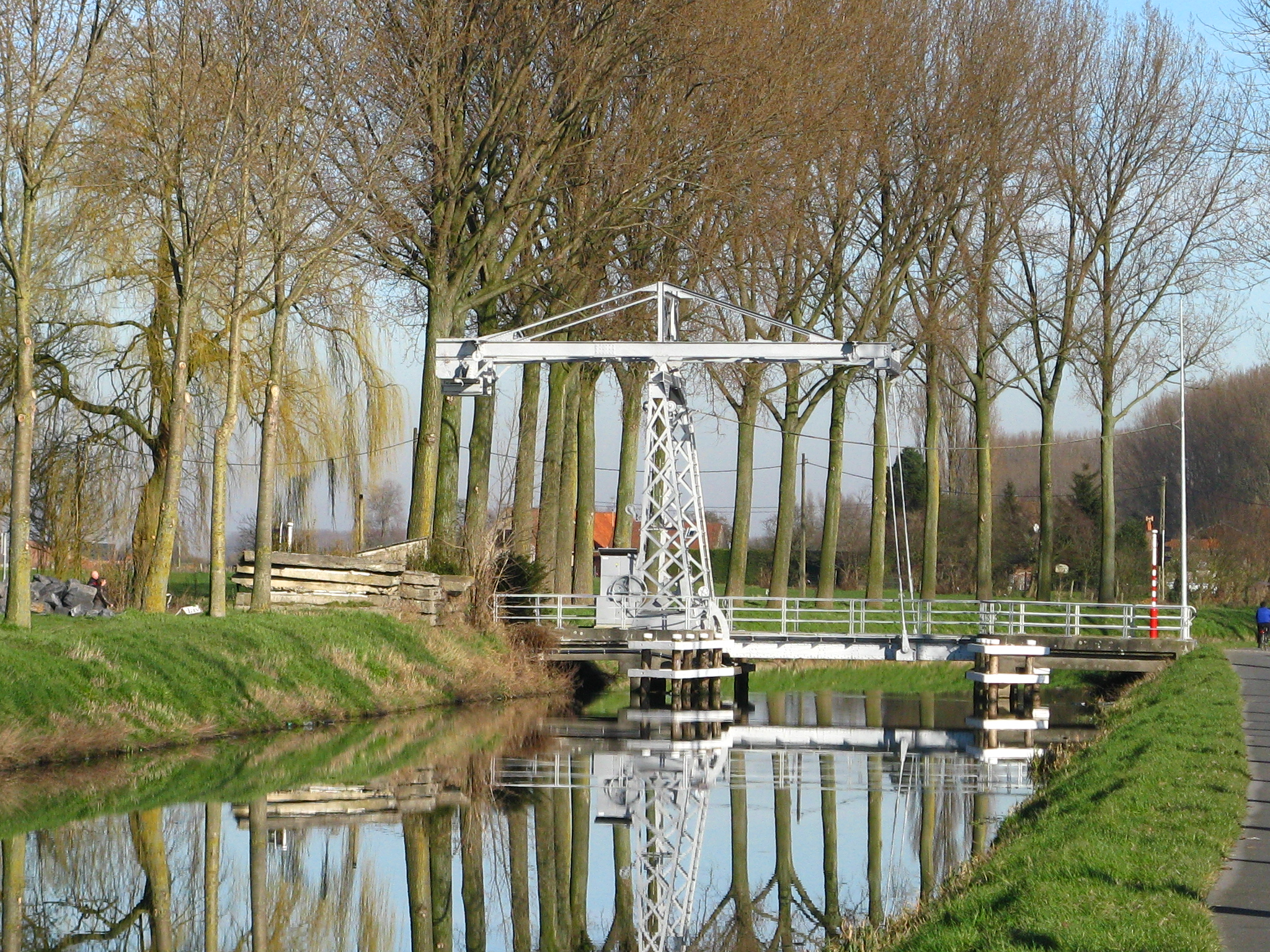 Estaimpuis. Canal de l'Espierre, liaison Deûle (Nord de la France)– Escaut.